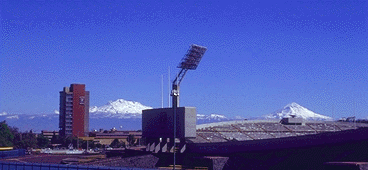 Instituto de Geofisica de la FU univercity UNAM